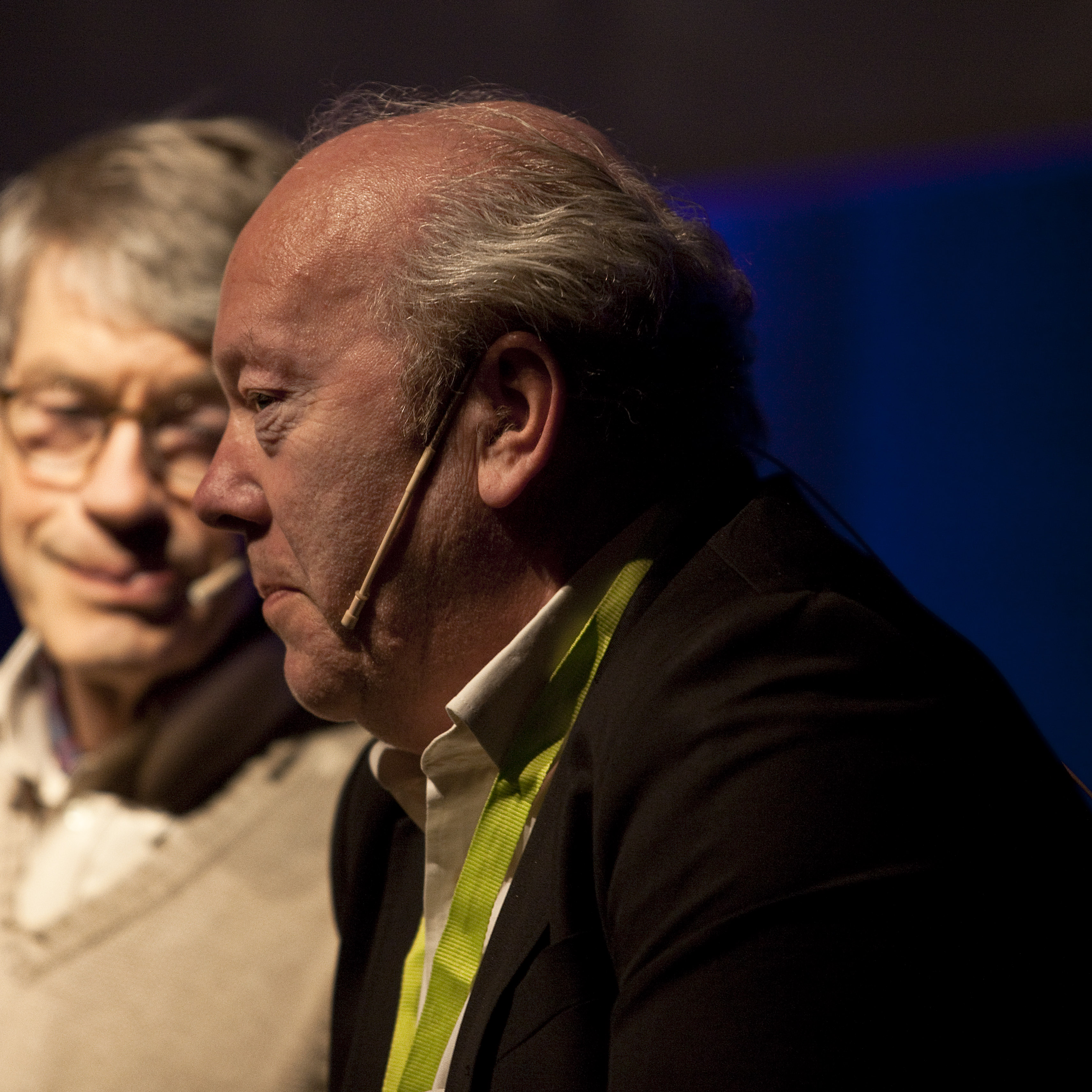 Pressens fantastiske historie.